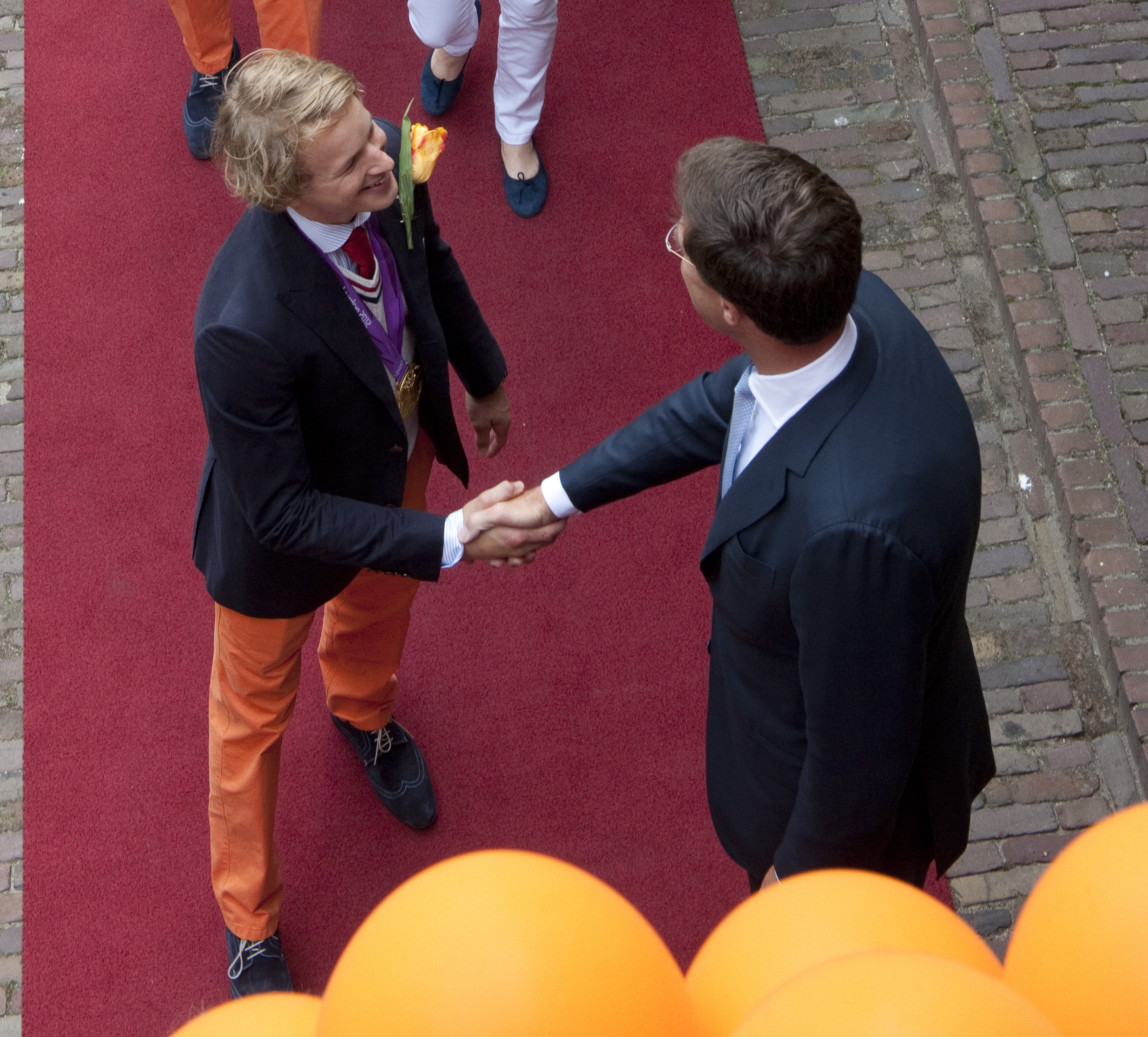 Minister-president Rutte feliciteert Olympisch kampioen Epke Zonderland voor de deur van het Torentje. De minister-president ontvangt de sporters voorafgaand aan de huldiging in de Ridderzaal.